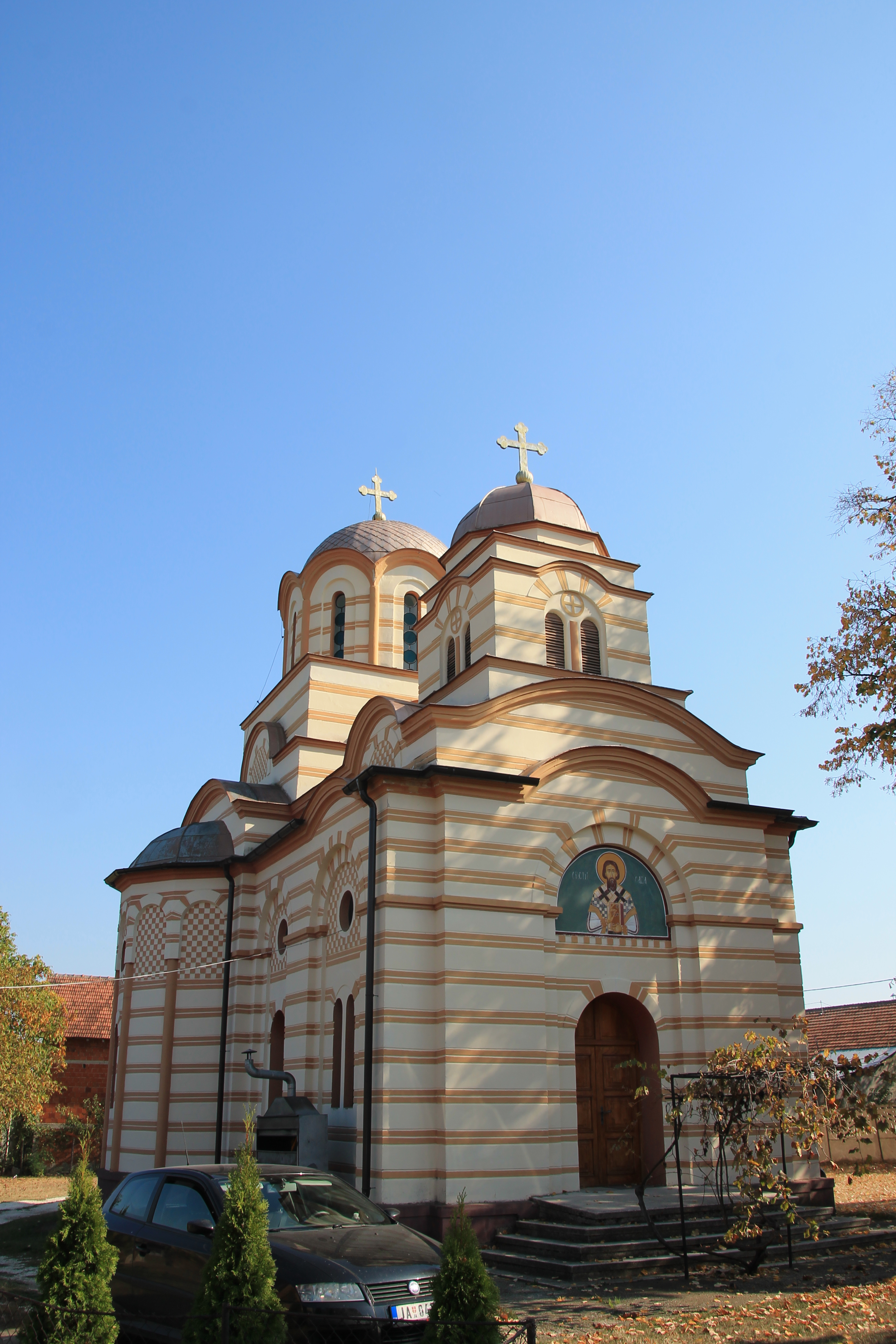 Crkva Sv. Save (Siokovac)